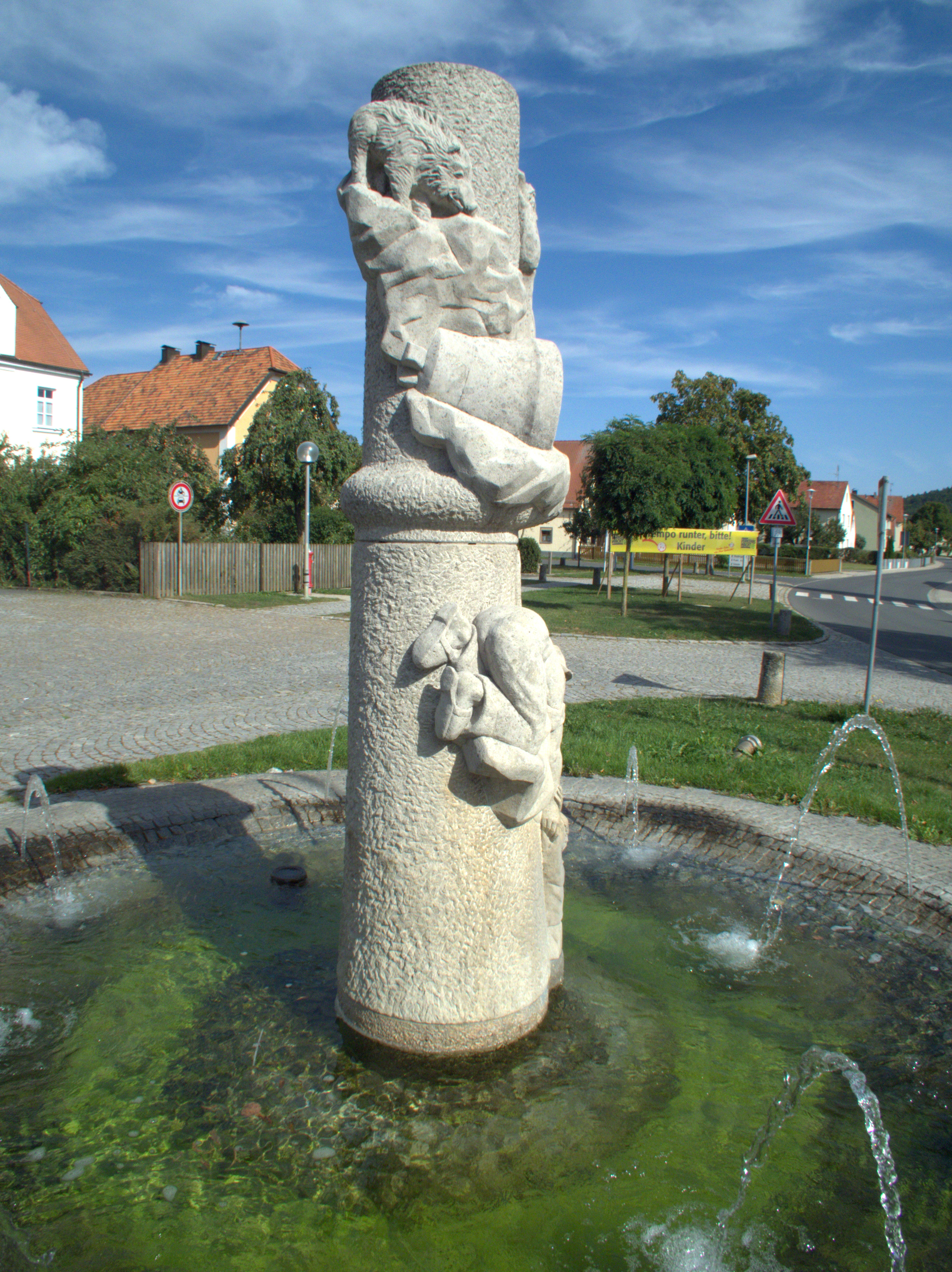 Berngau: Dorfbrunnen